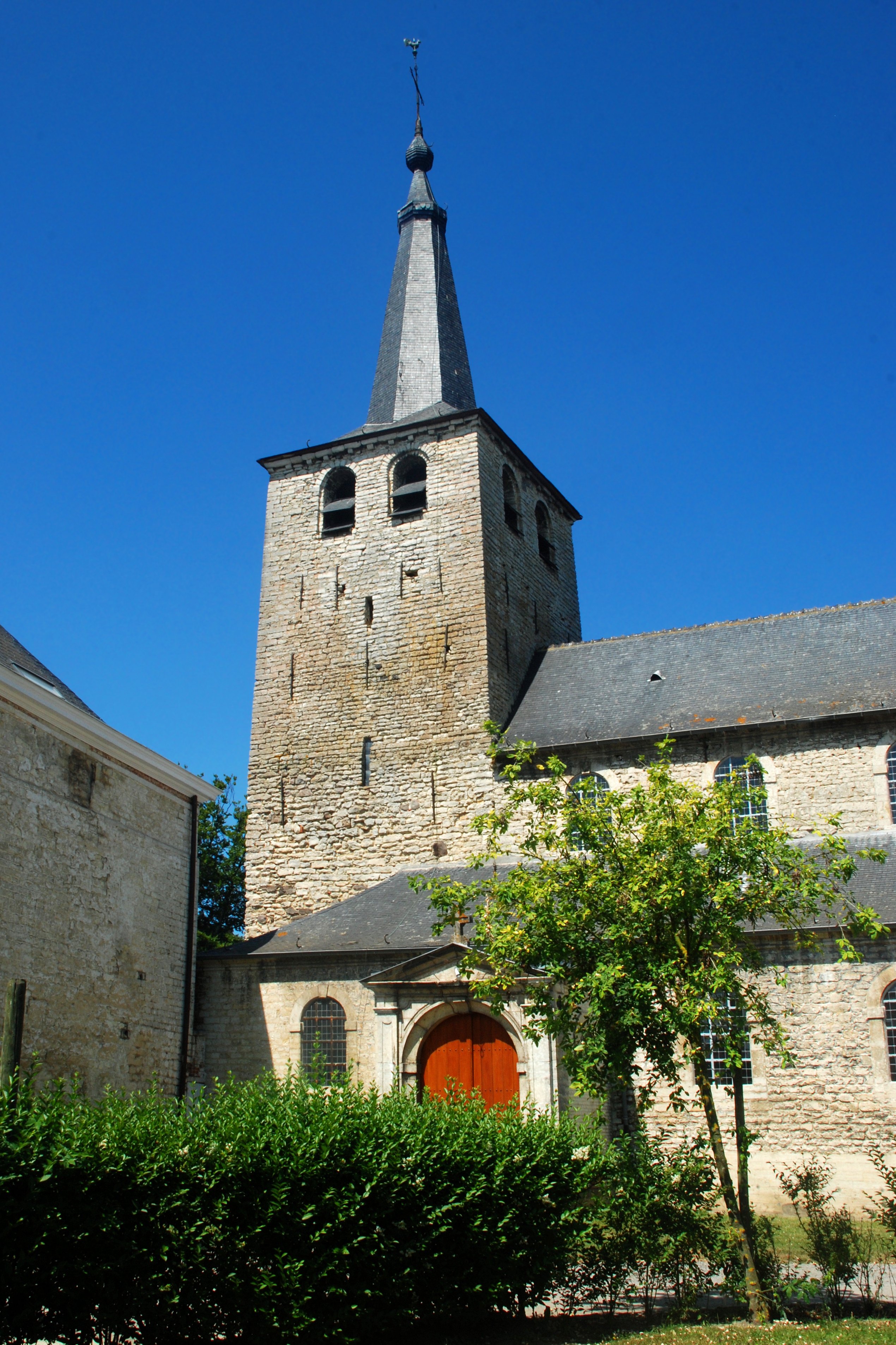 Belgique - Brabant wallon - Jodoigne - Zétrud-Lumay - Église Saint-Barthélemy